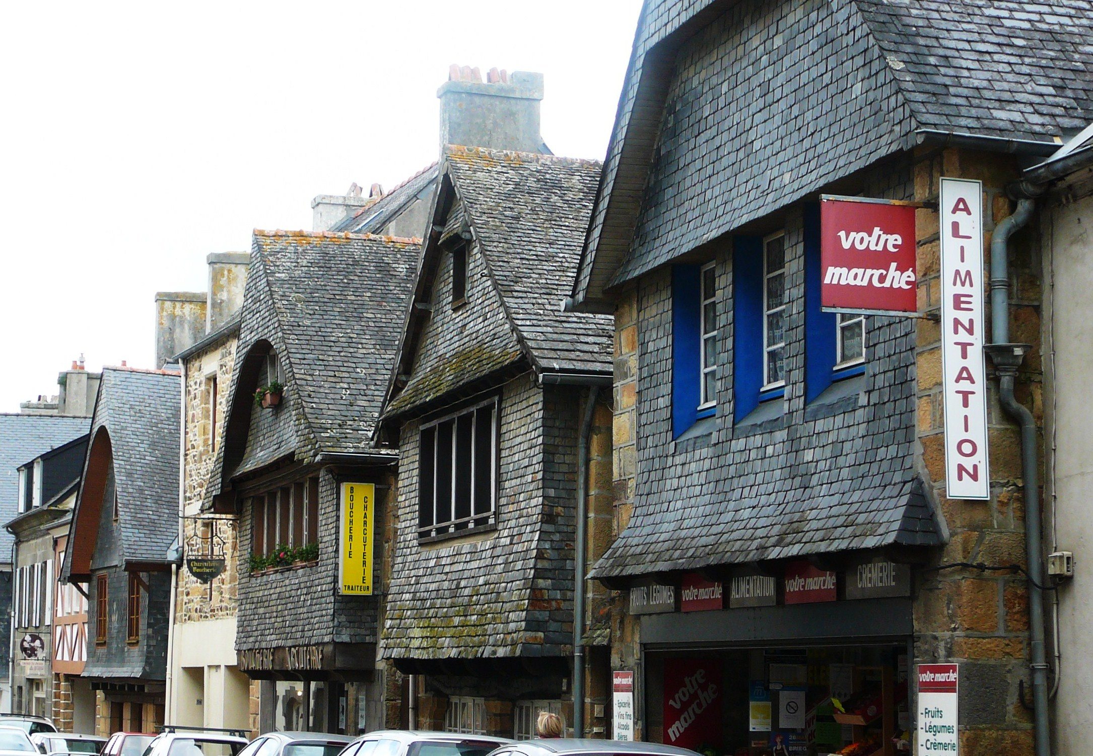 Le Faou : maisons à pans de bois rue pricipale